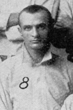 Bill Dammann